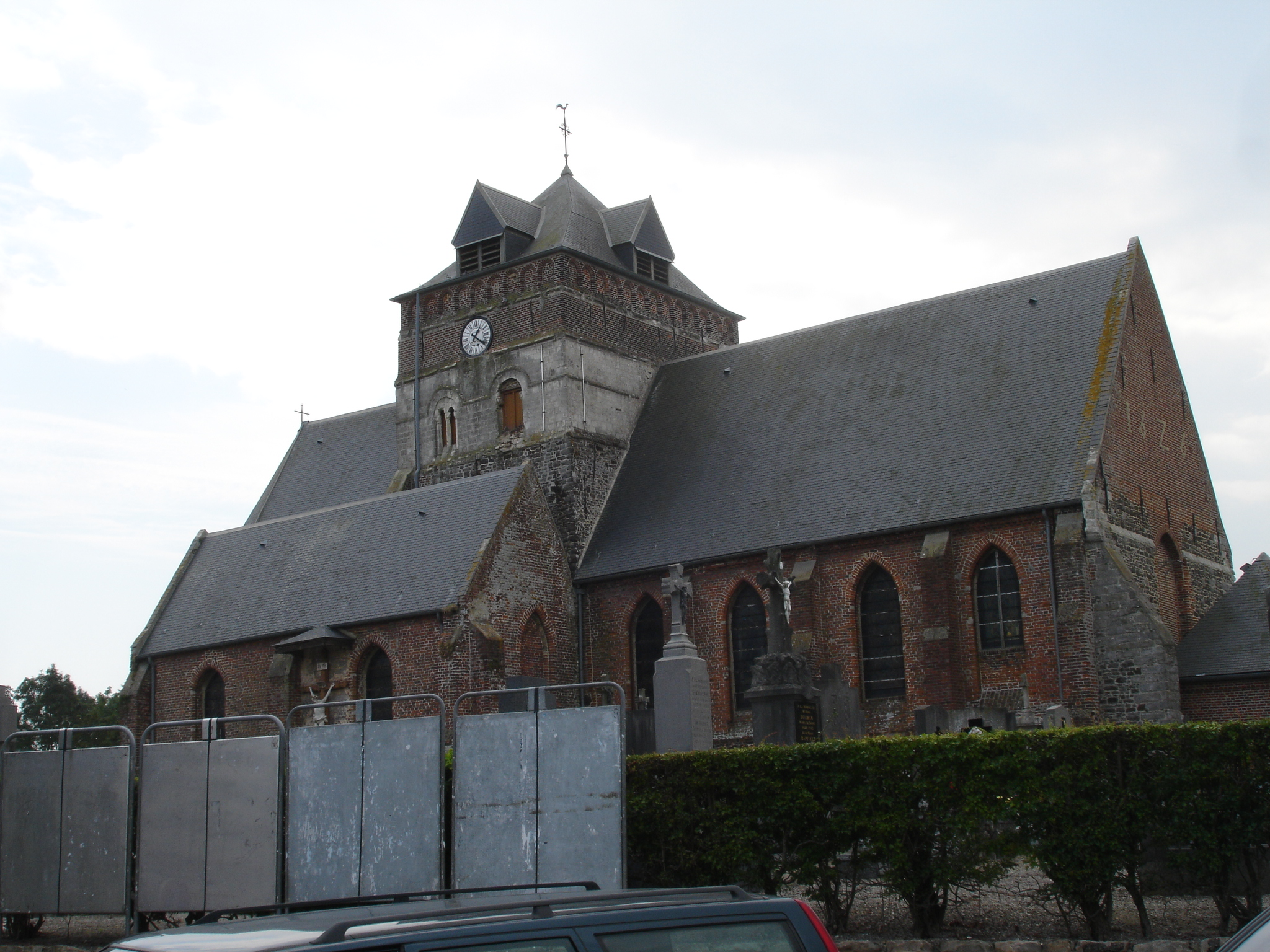 Vue de l´Eglise du nord